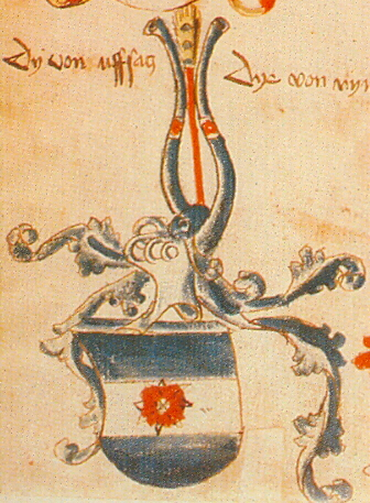 Wappen der Familie von Aufseß